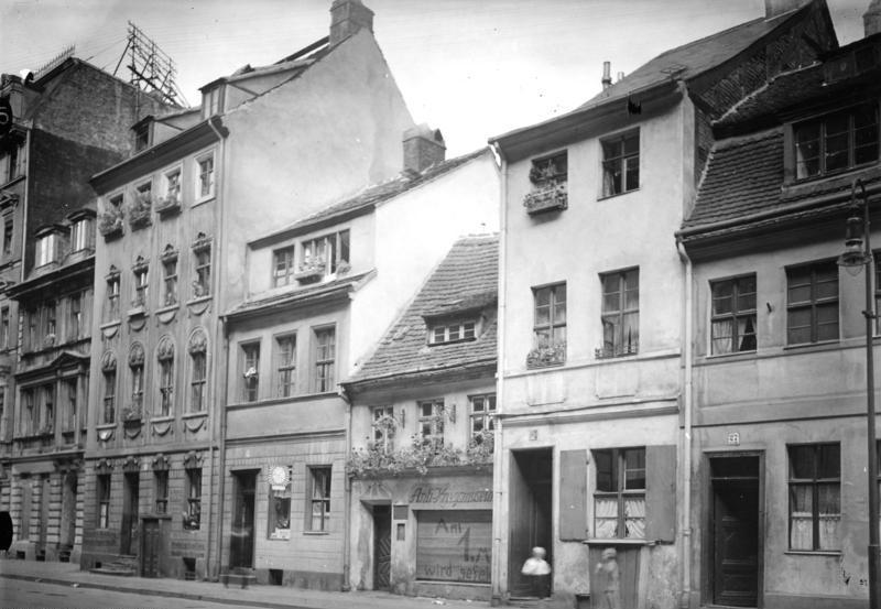 Aufnahme 1930 Alt-Berlin Rund um den Molkenmarkt Information added by Wikimedia users.Ergänzung: Das Foto zeigt die Häuser Parochialstraße 27-32 (von rechts), zwischen Klosterstraße und Jüdenstraße. Die Häuserzeile wurde 1936 für den Neubau des Geschäftshauses der Feuersozietät (heute: Neues Stadthaus) abgerissen. Im Haus Nr. 29 sieht man den ersten Standort des Internationalen Anti-Kriegs-Museums, das der Pazifist Ernst Friedrich 1925 gegründet hatte. Von den Nationalsozialisten 1933 zerstört und von Friedrich 1936 im belgischen Exil für nur kurze Zeit wieder eröffnet, wurde es 1982 in Berlin wiedergegründet. Sein heutiger Sitz ist die Brüsseler Straße 21 in Berlin-Wedding. Das Haus Parochialstraße 29 wurde ab 1933 als "Sturmlokal" von der SA benutzt und diente als "Folterkeller" für politische Gegner.